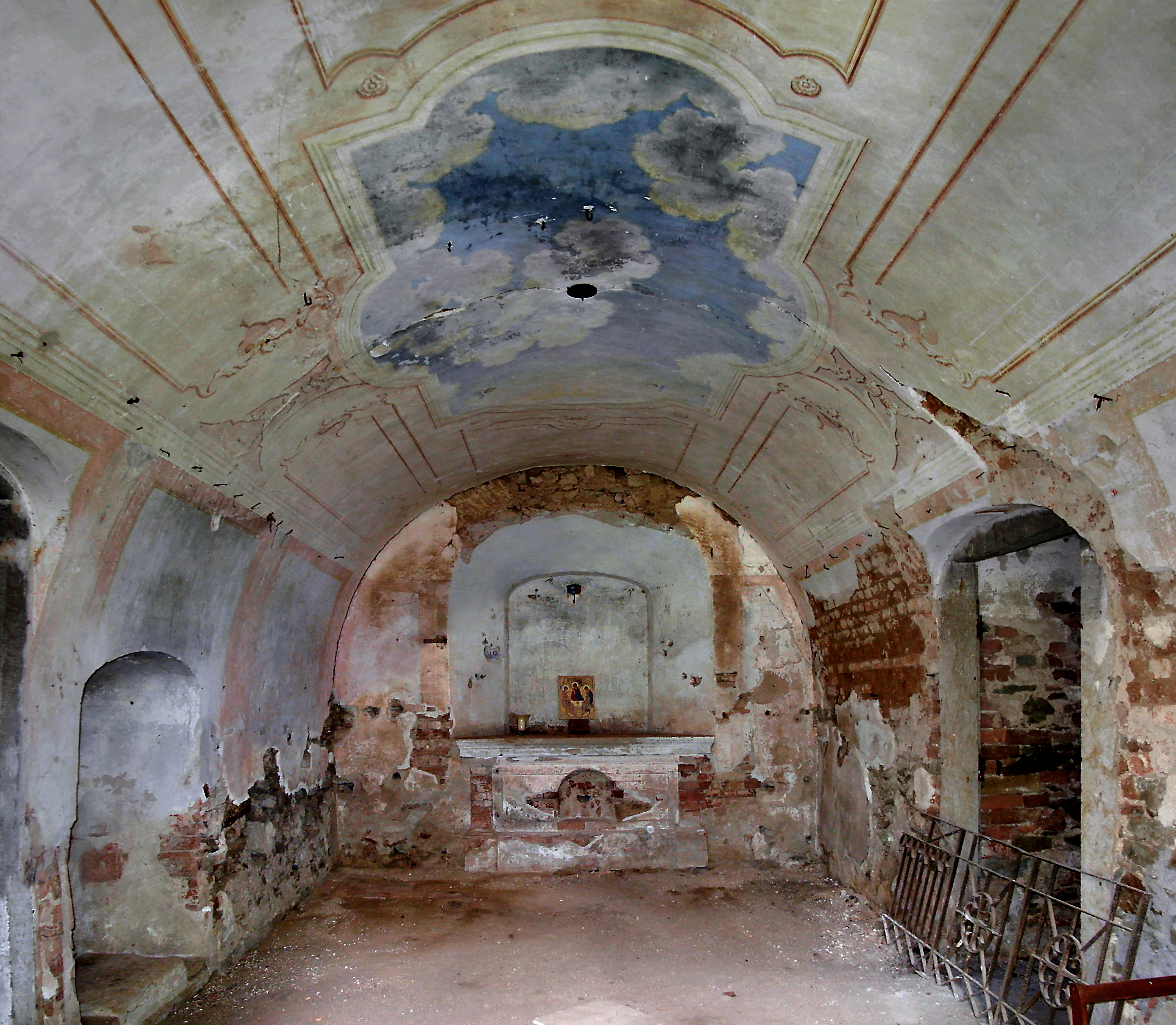 12.05.2017 01594 Jahnishausen (Riesa), Jahnatalstraße 4: Schloß. Die katholische Schloßkapelle im EG des Ostflügels erinnert an die Nutzung durch Prinz Johann von Sachsen und die königliche Familie. [SAM9842-9843.JPG]20170512590MDR.JPG(c)Blobelt